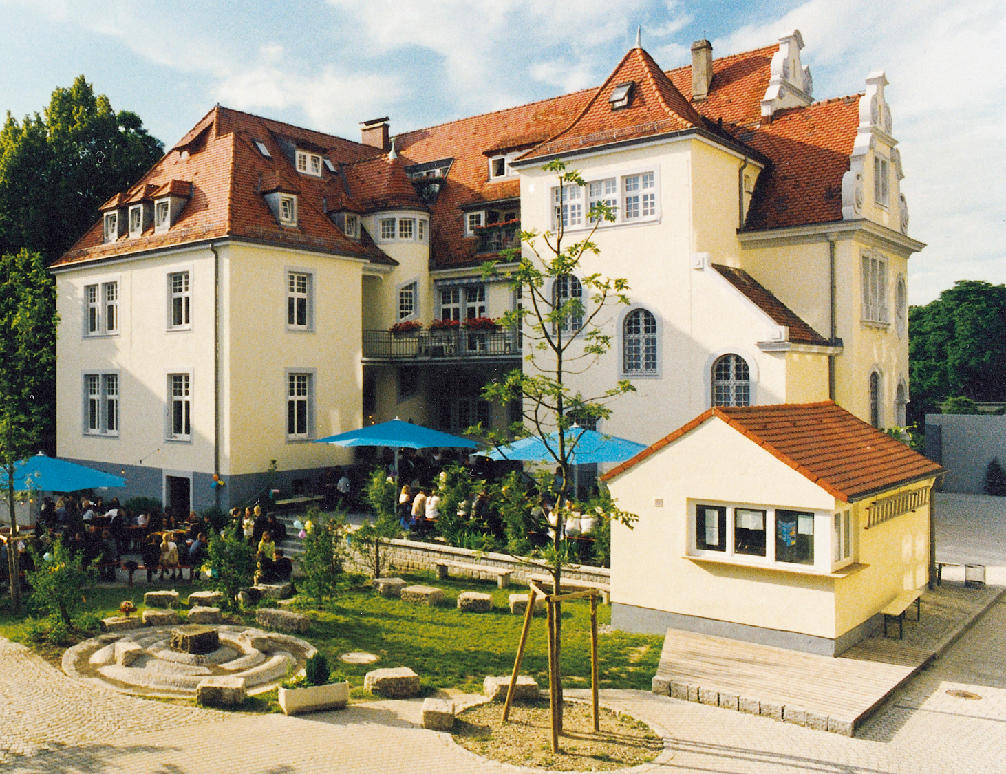 IUCE Freiburg, ehemaliges französisches Konsulat